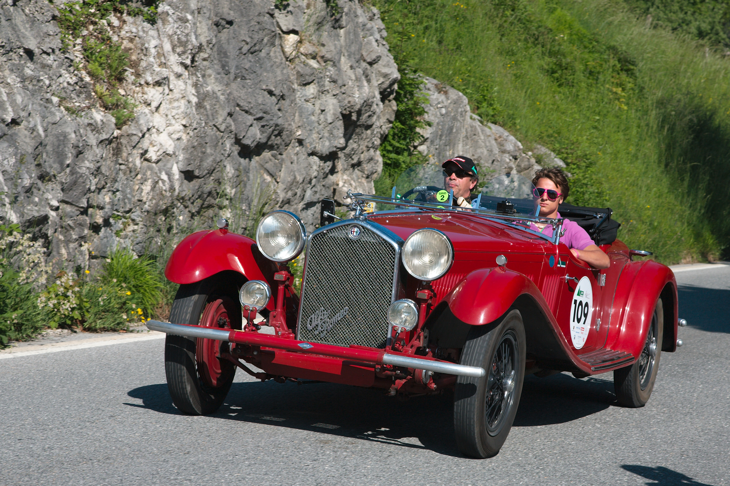 Alfa Romeo 6C 1750 GTC (1932) at Gaisbergrennen 2009